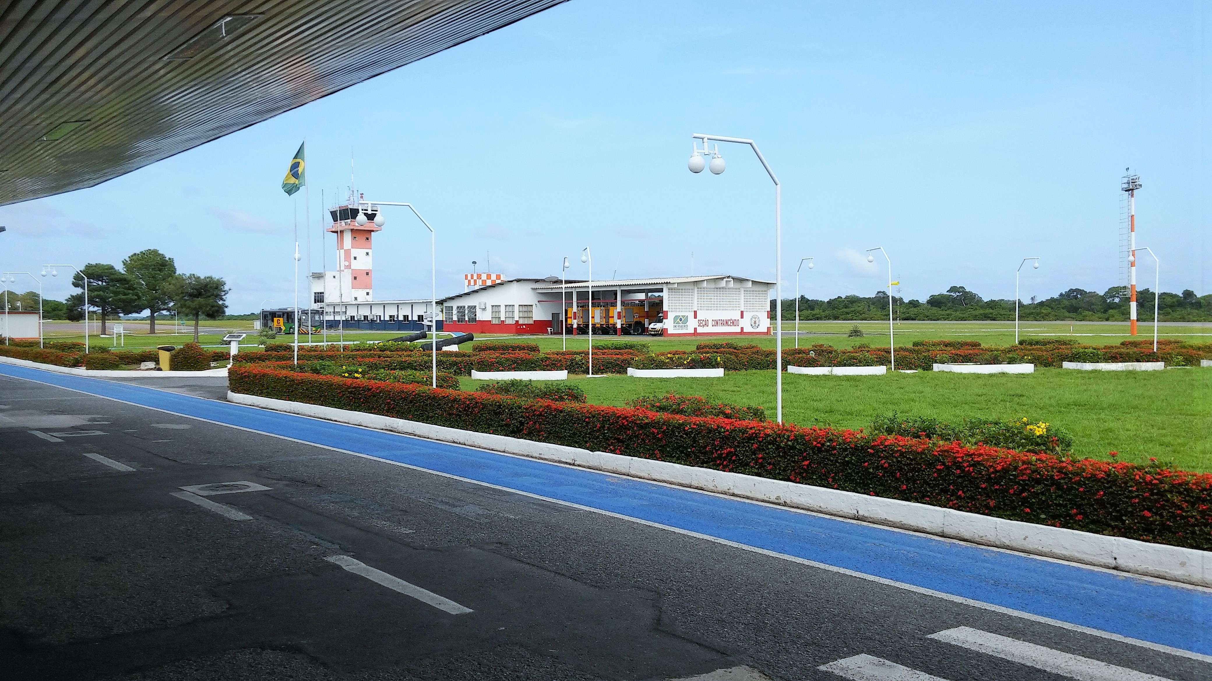 Aeroporto Internacional de Santarém.